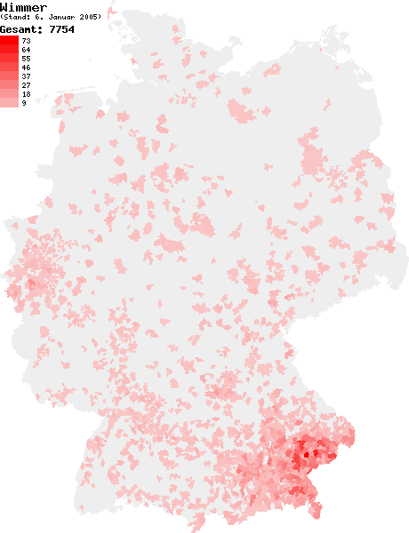 Verteilung des Nachnamens Wimmer in Deutschland nach dem Telefonbuch mit Stand vom 6. Januar 2005